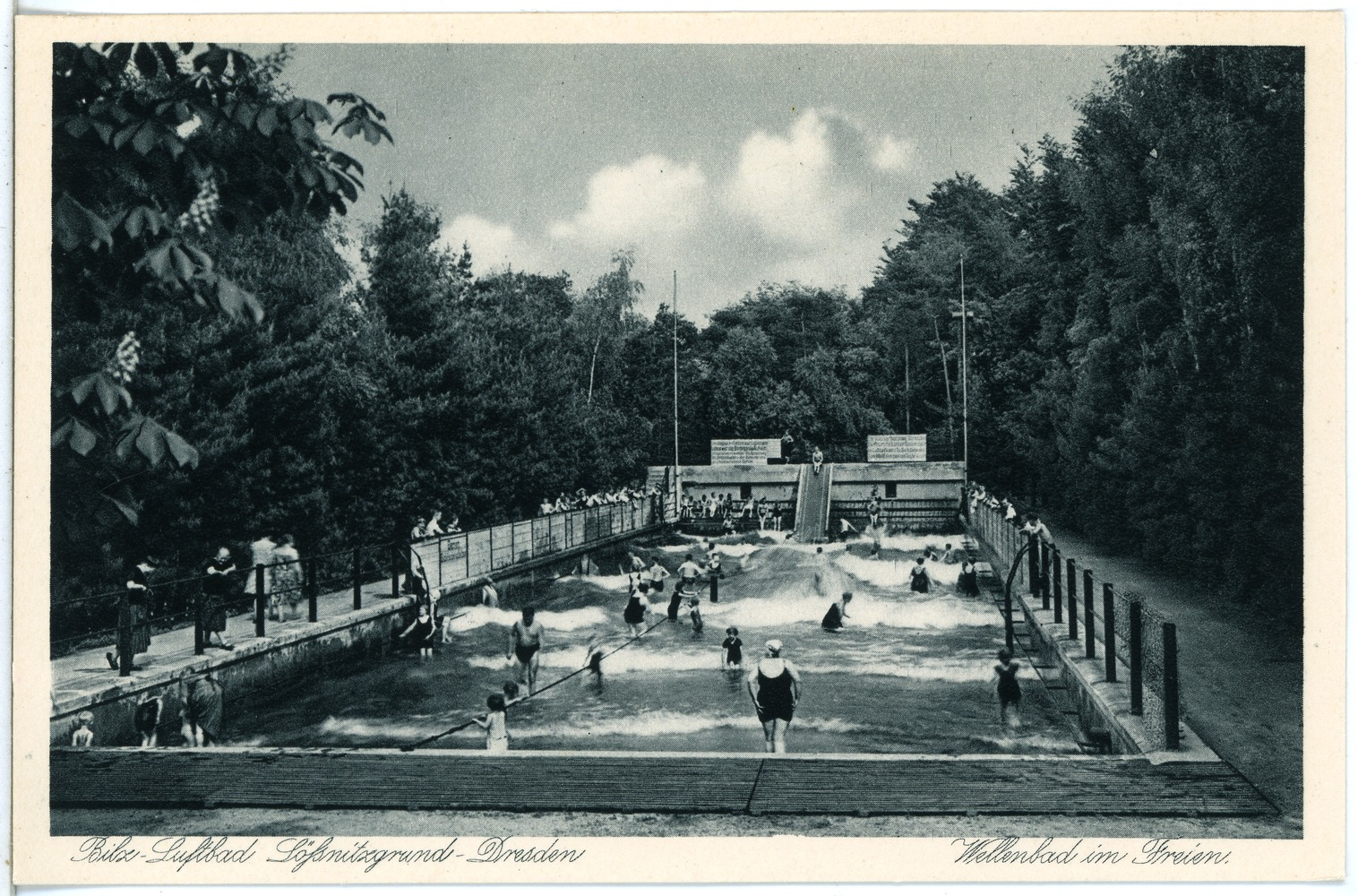 Radebeul; Bilzbad - Wellenbad This postcard is from publisher Brück & Sohn in Meißen ( postcard has a unique number 24417 and is available in a higher resolution at the publisher. This images was uploaded in a cooperation project between Wikipedians and the publisher.